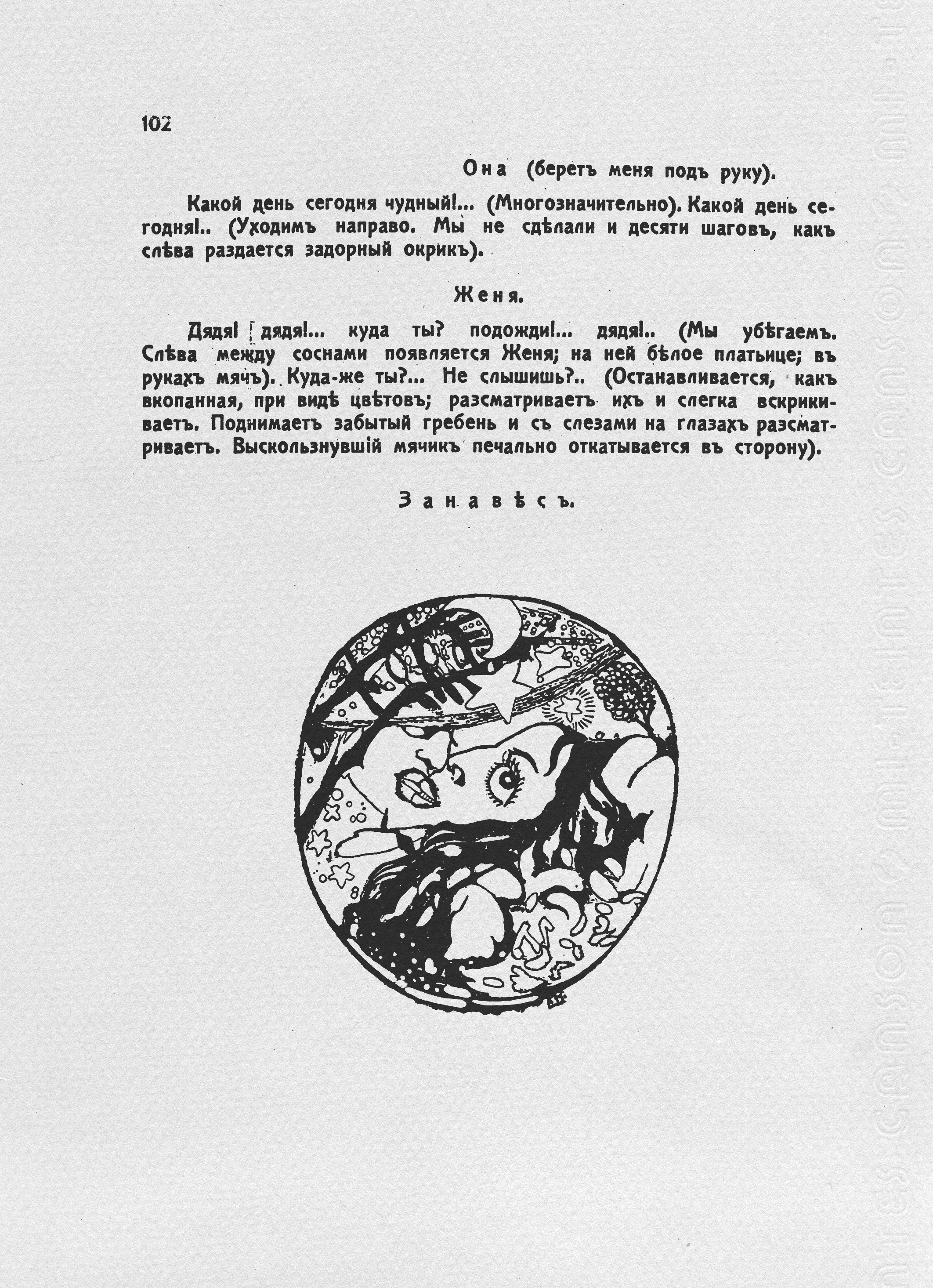 копия страницы из книги "Студия импрессионистов". Н. Евреинов. "Представление любви". Заставка Е. П. Ващенко. СПб. 1910